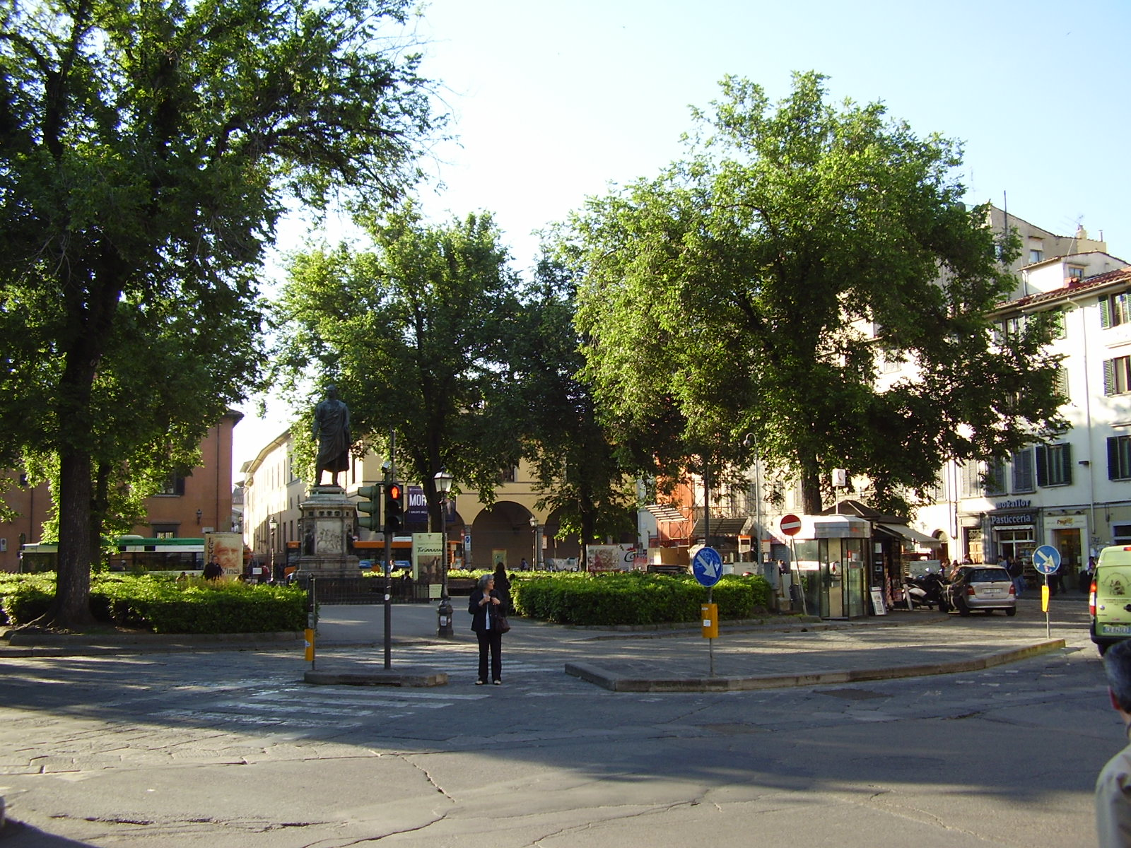 Piazza San Marco, Square view in Florence, Italy Firenze